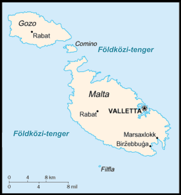 Málta és Gonzo térképvázlata